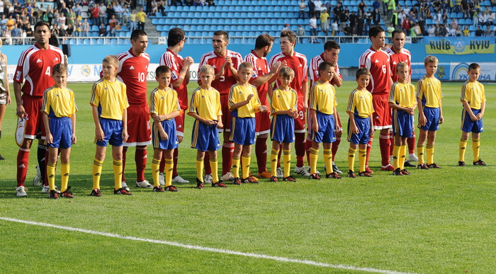 Сборная Андорры перед матчем с Украиной в 2009 году